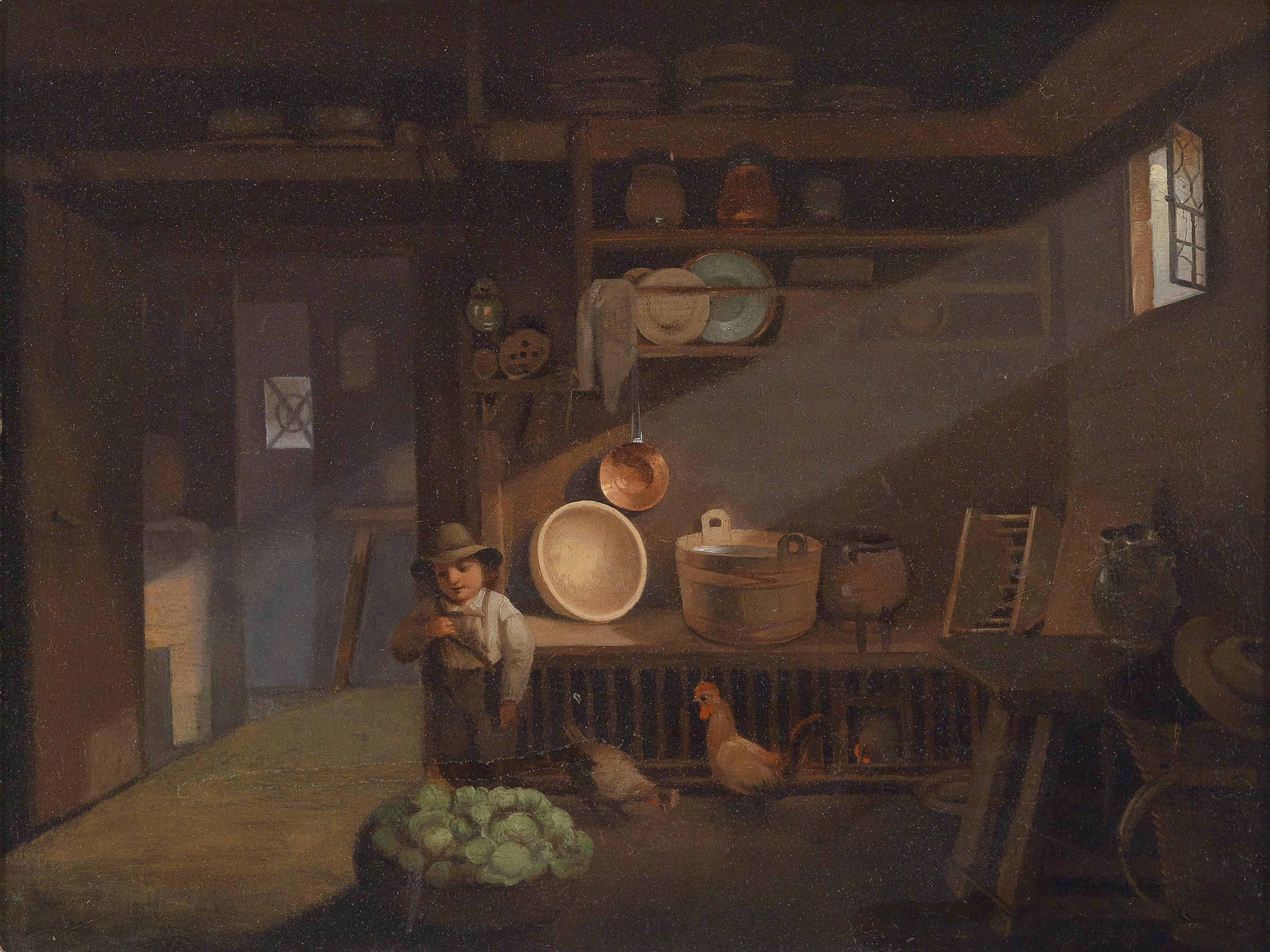 Bauernbub in der Vorratskammertitle QS:P1476,de:"Bauernbub in der Vorratskammer" label QS:Lde,"Bauernbub in der Vorratskammer"